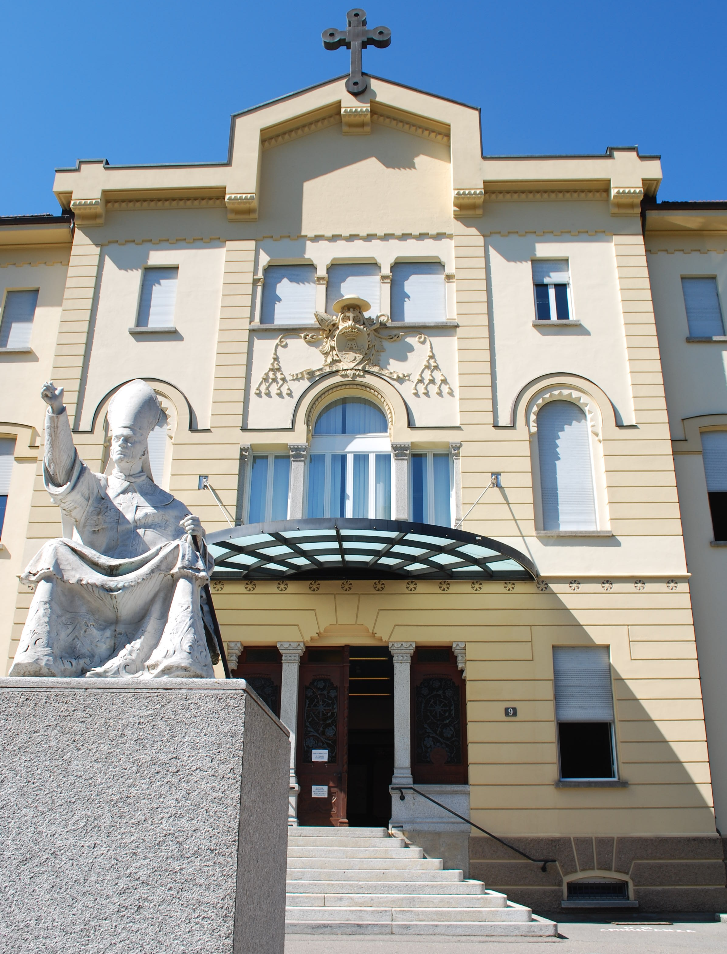 Entrata del Centro San Carlo, Lugano, CH. Sede della fonoteca nazionale svizzera. Con dettaglio della statua di San Carlo